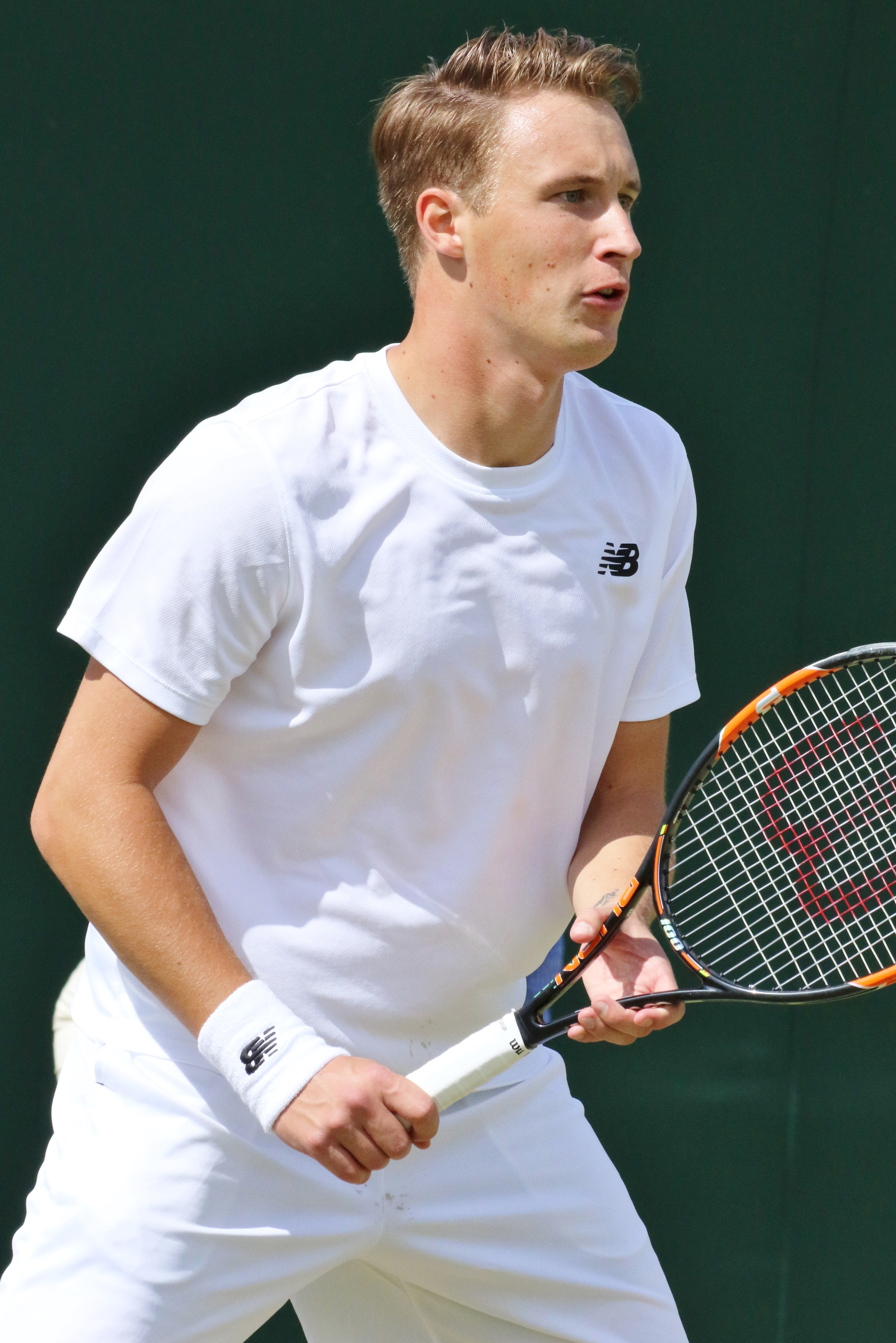 Kontinen WM16 (16)